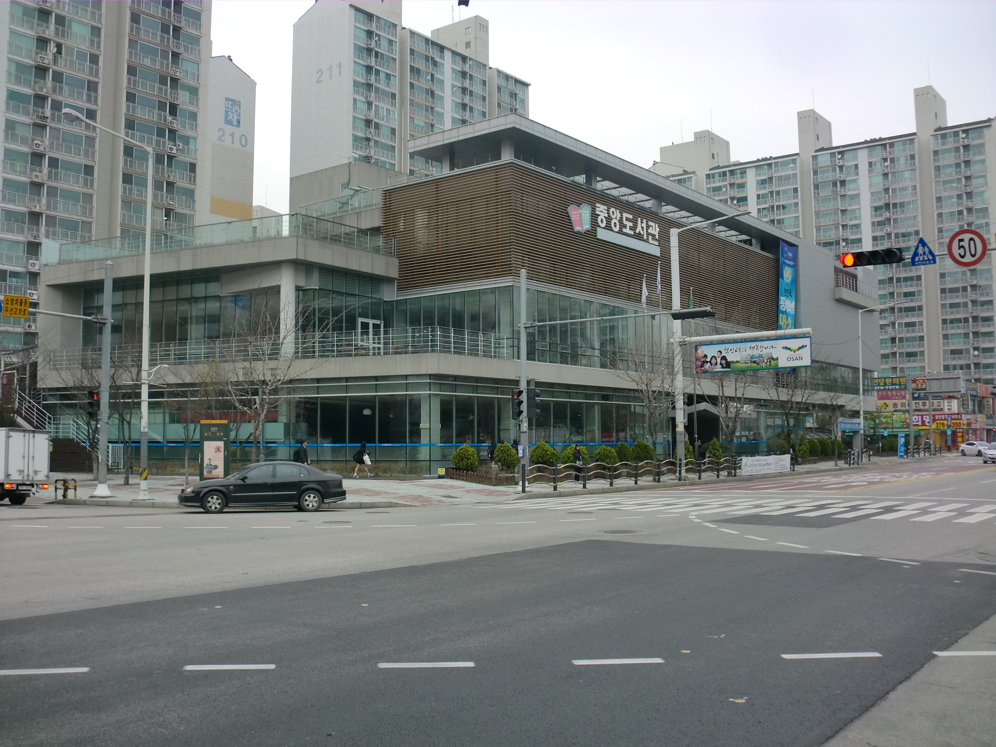 경기도 오산시에 있는 오산시립중앙도사관